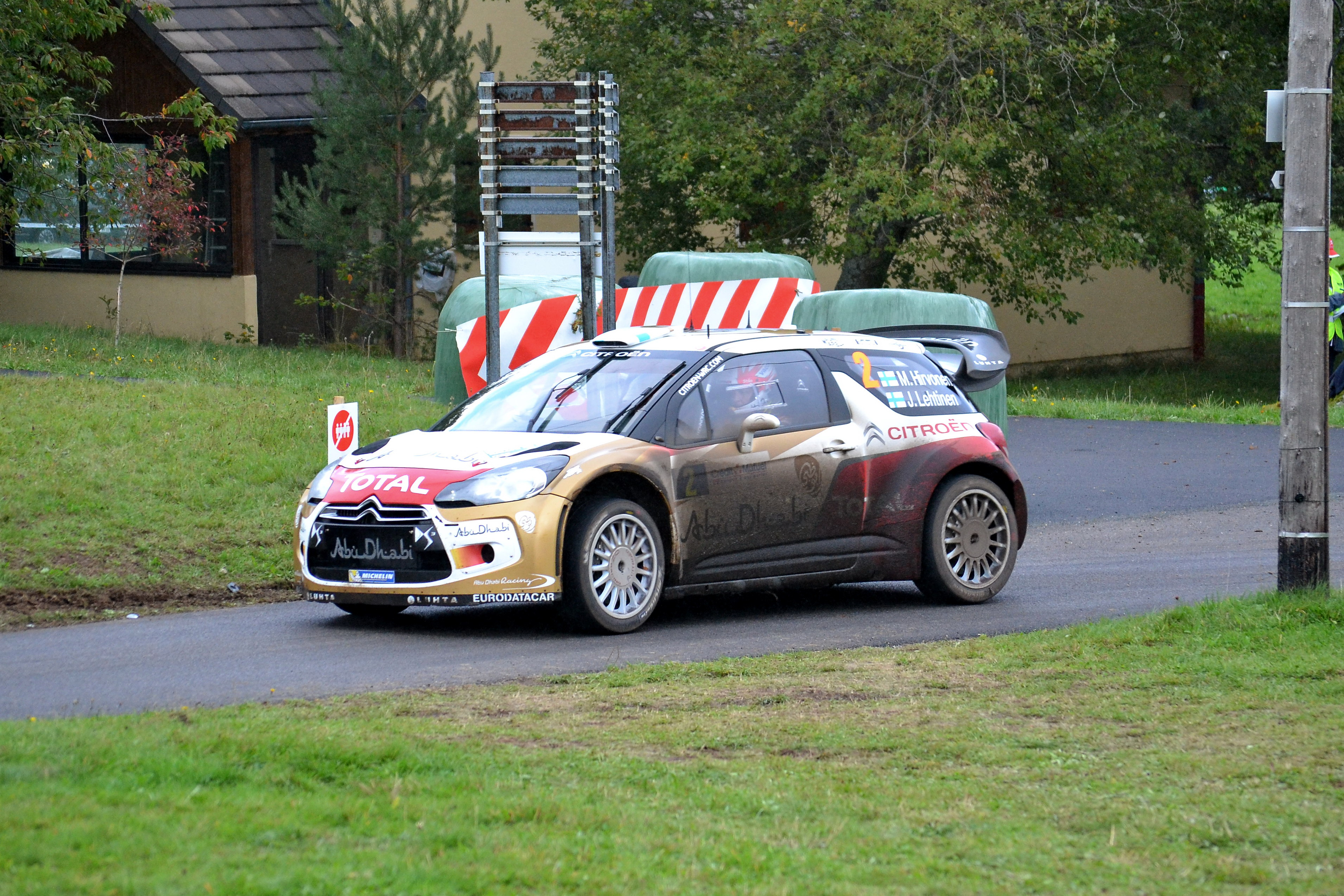 Rallye WRC France-Alsace 2013, ES13 Soultzeren - Pays Welche 2 à Labaroche. Citroën DS3 WRC - Mikko Hirvonen / Jarmo Lehtinen